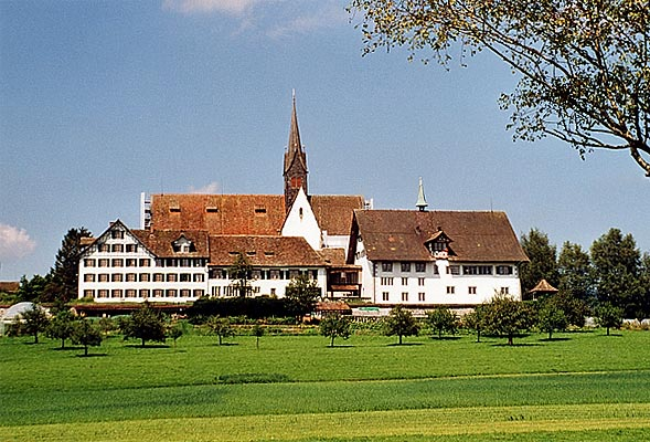 View form Kappel am Albis